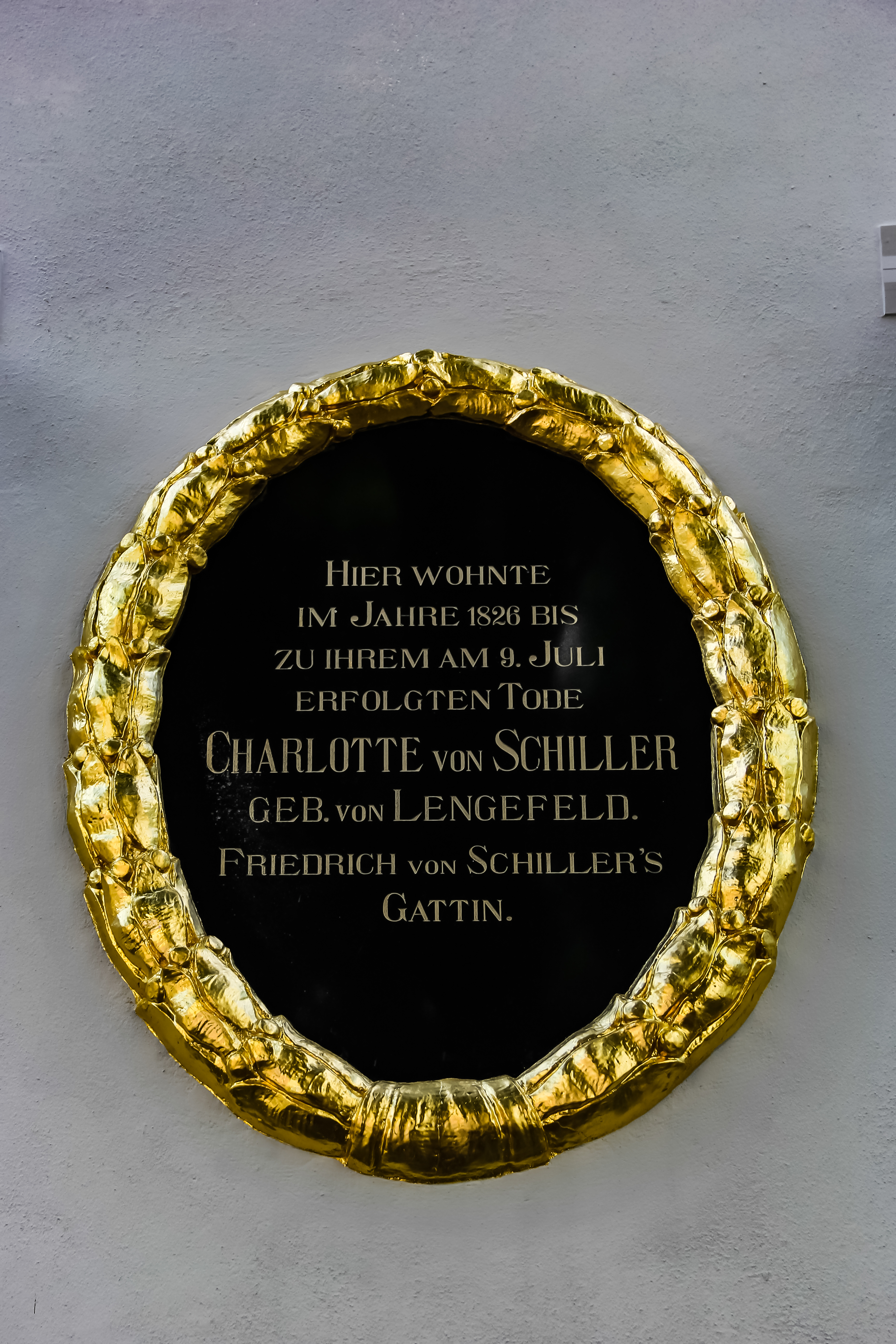 Fürstenstraße 1, hier wohnte Charlotte von Schiller im Jahr 1826.